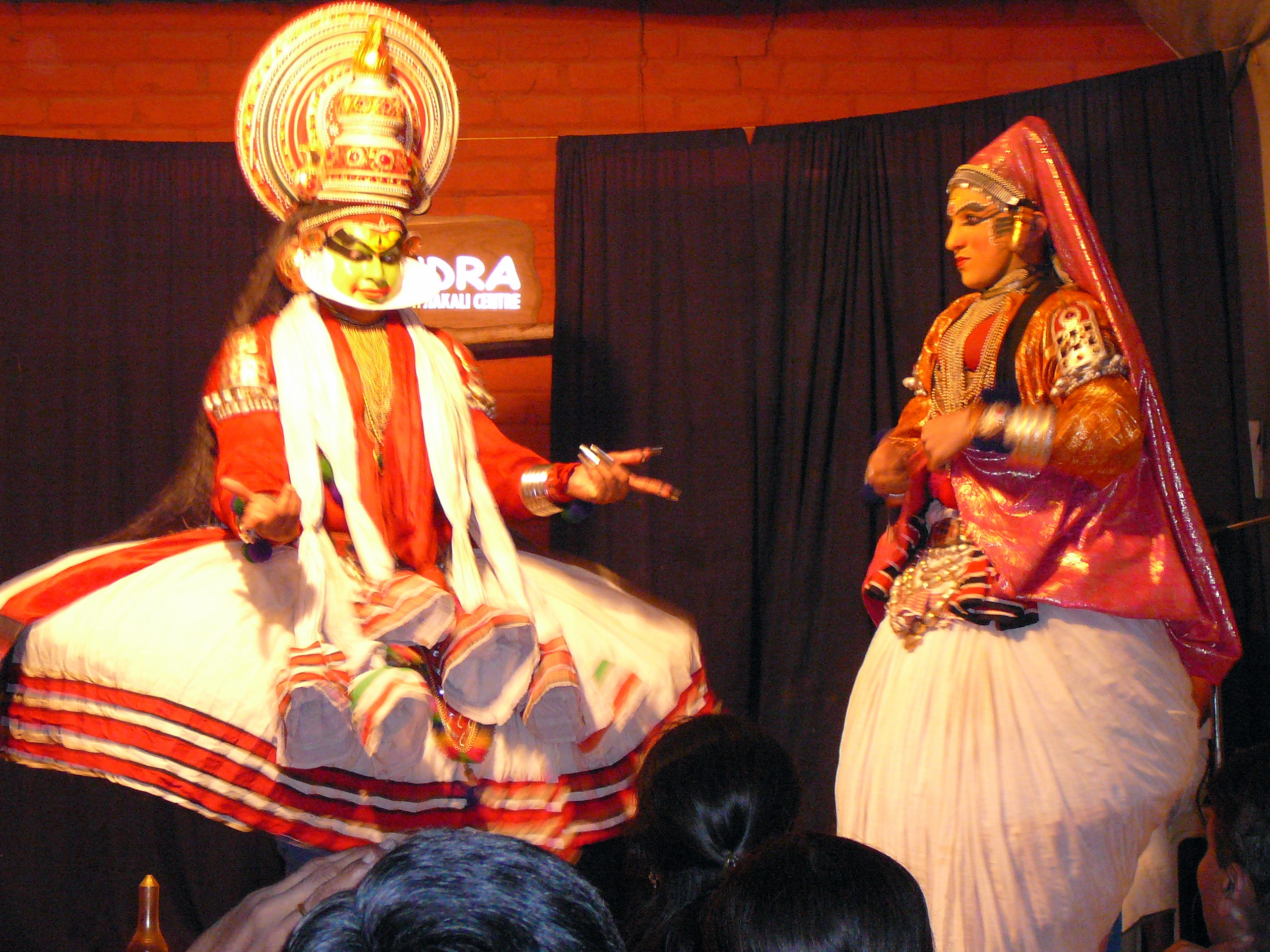 Kathakali performance at Thekkady.